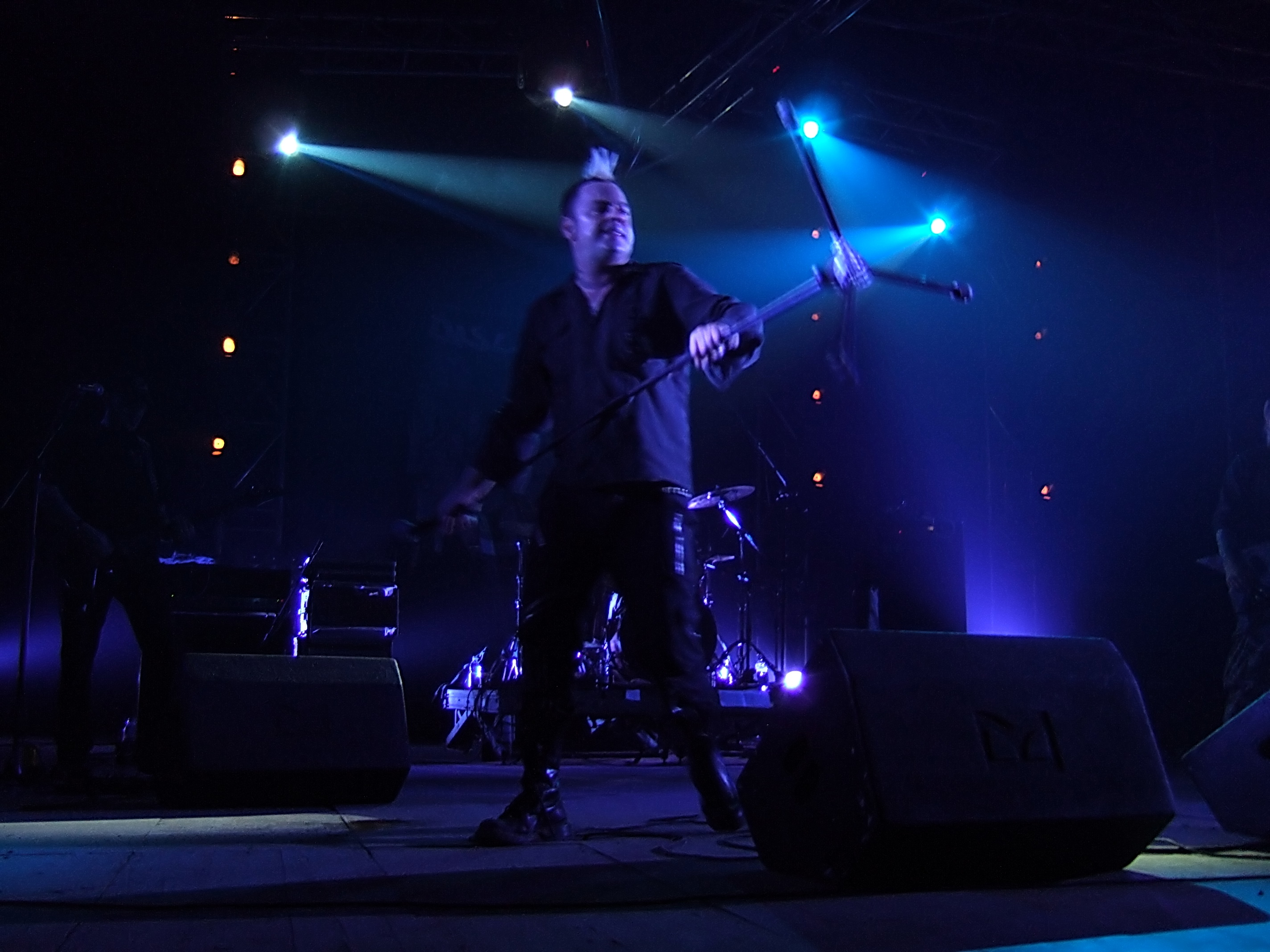 Discharge live in Rome, 17 December 2006